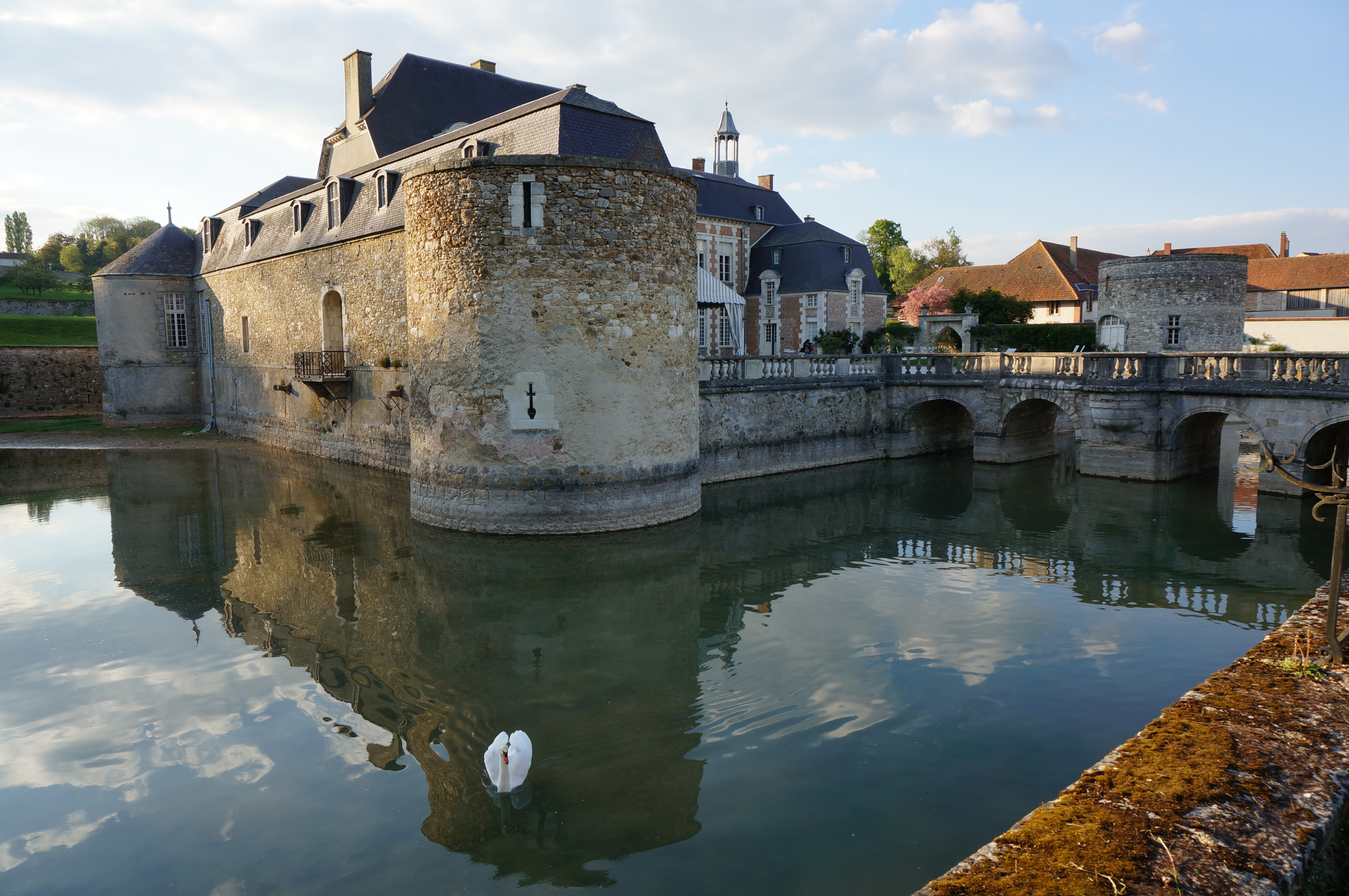 Douves_du_château d'Etoges.